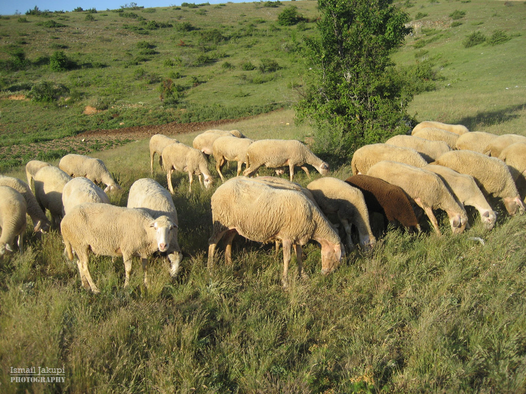 Delet e Brrutit